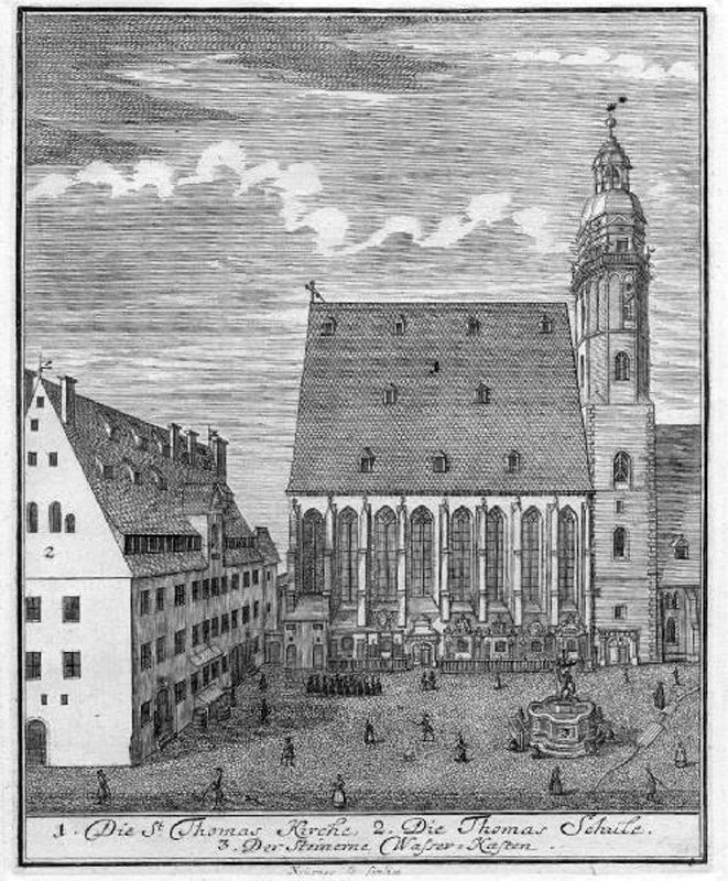 Titelkupfer zu der "Neuen Ordnung" der Thomasschule 1723